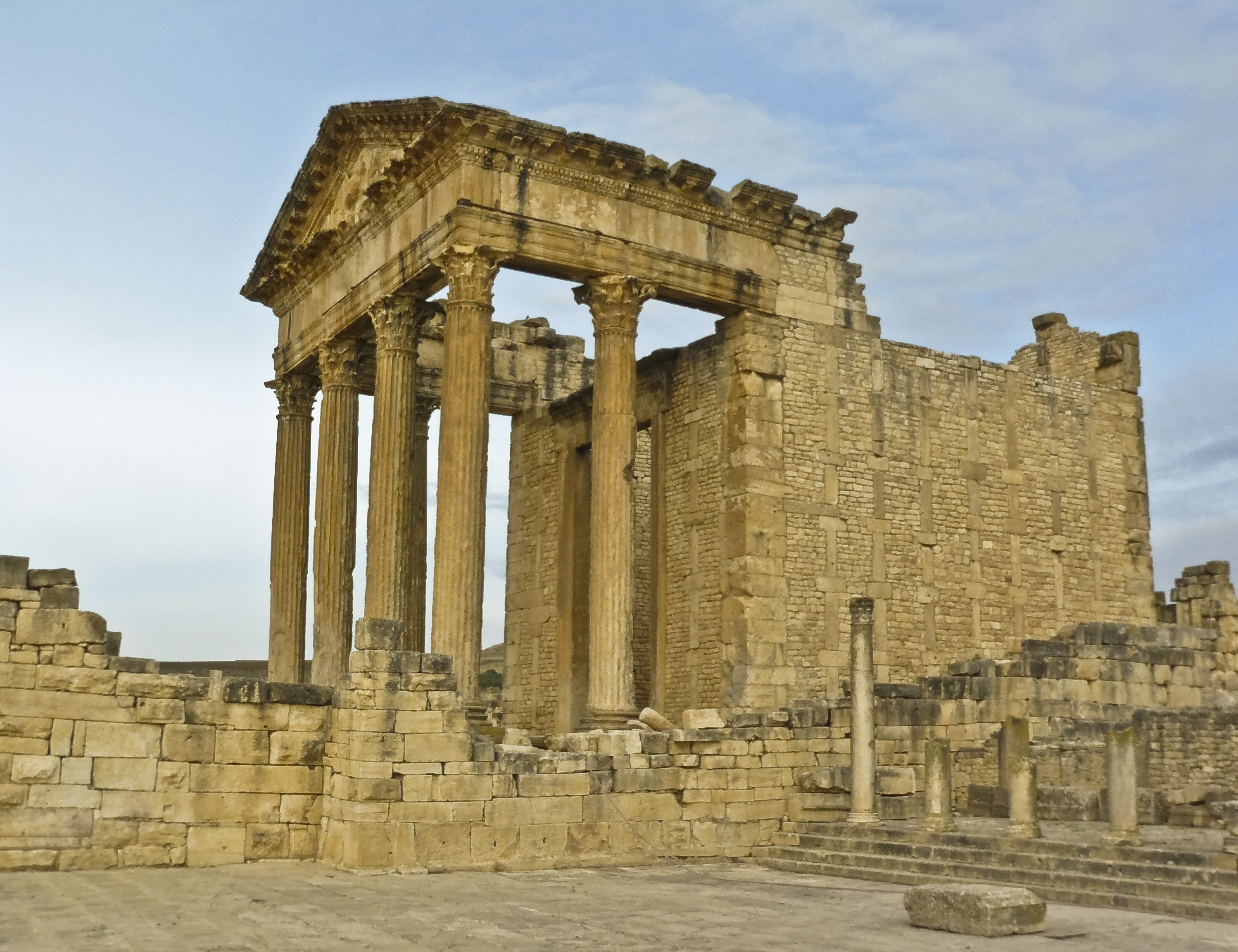 Capitolio de Dougga (Túnez)